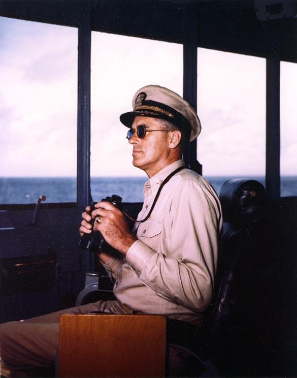 Obra da marinha americana, uma agência governamental dos EUA. A grande maioria dos trabalhos de agências governamentais dos EUA estão em PD.